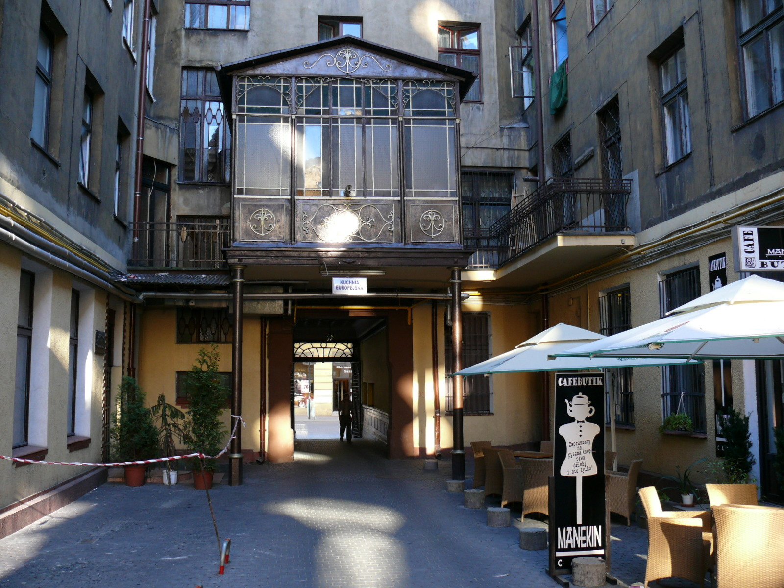 Synagoga Chaskiela Pelca przy ul Piotrkowskiej 88 w Łodzi